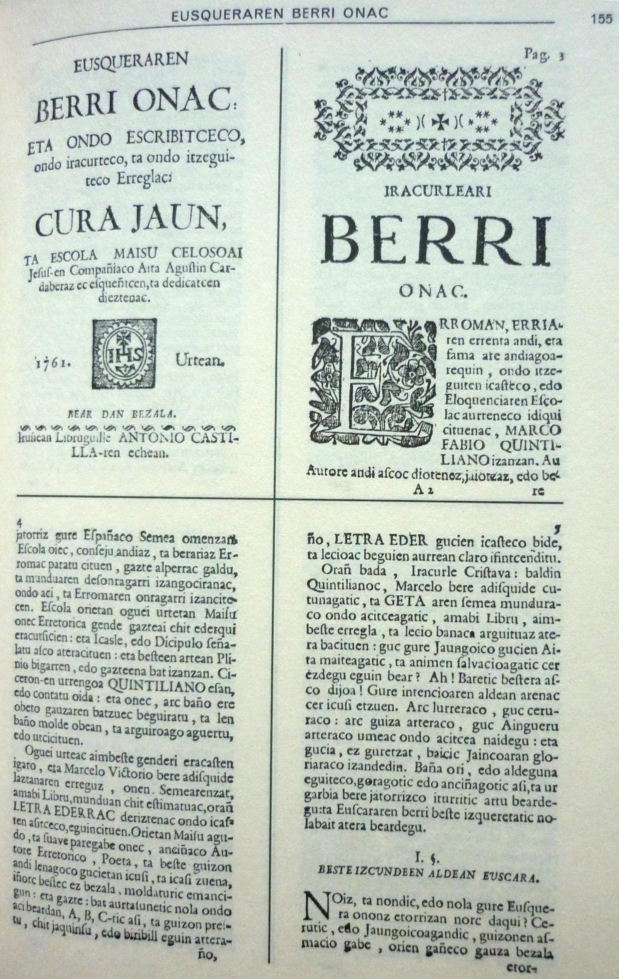 Agustin Kardaberazen "Euskararen berri onak".